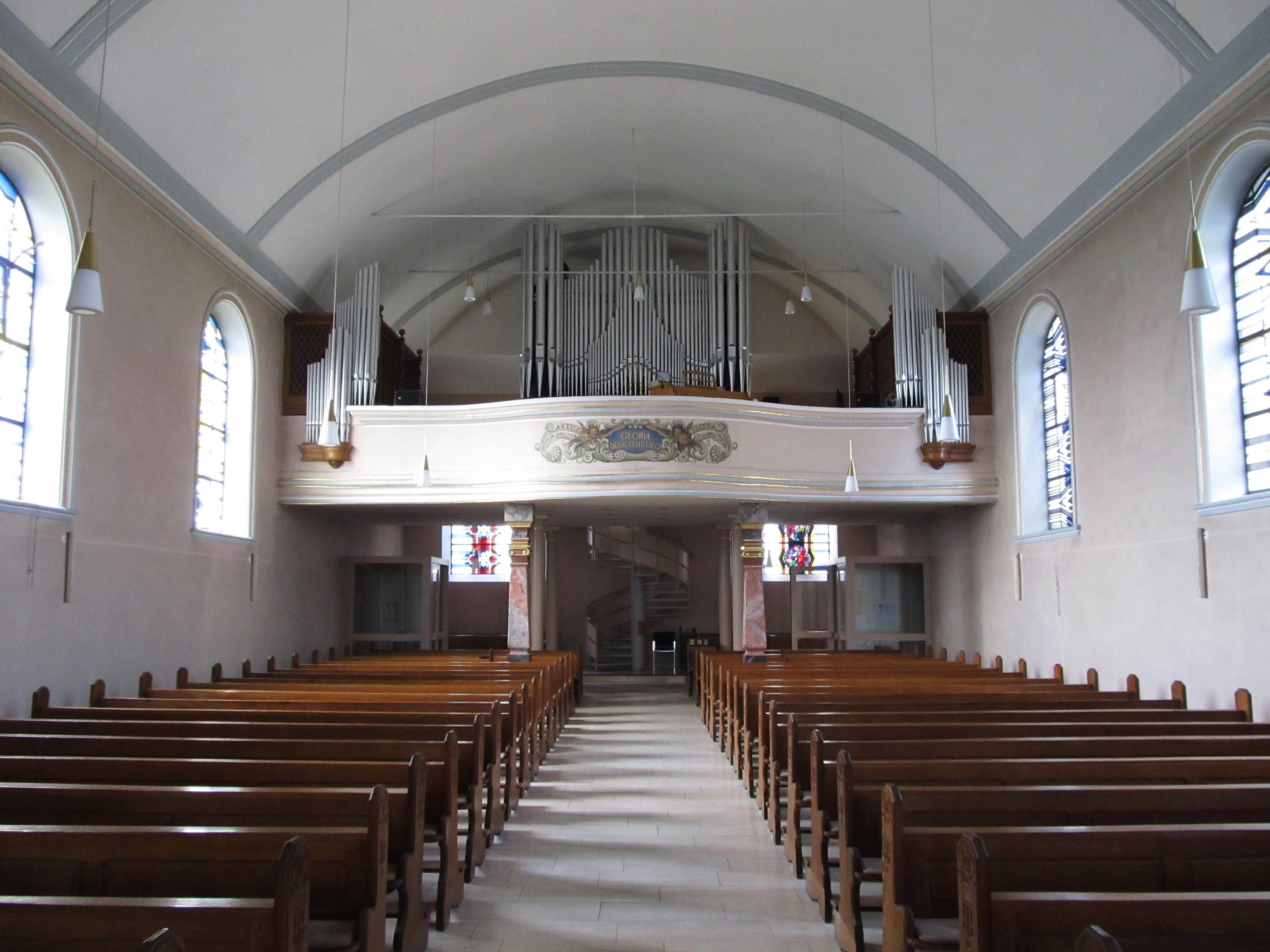 Blick vom Altarraum in Richtung Empore und Orgelprospekt der St. Peterskirche in Ensheim, Saarland